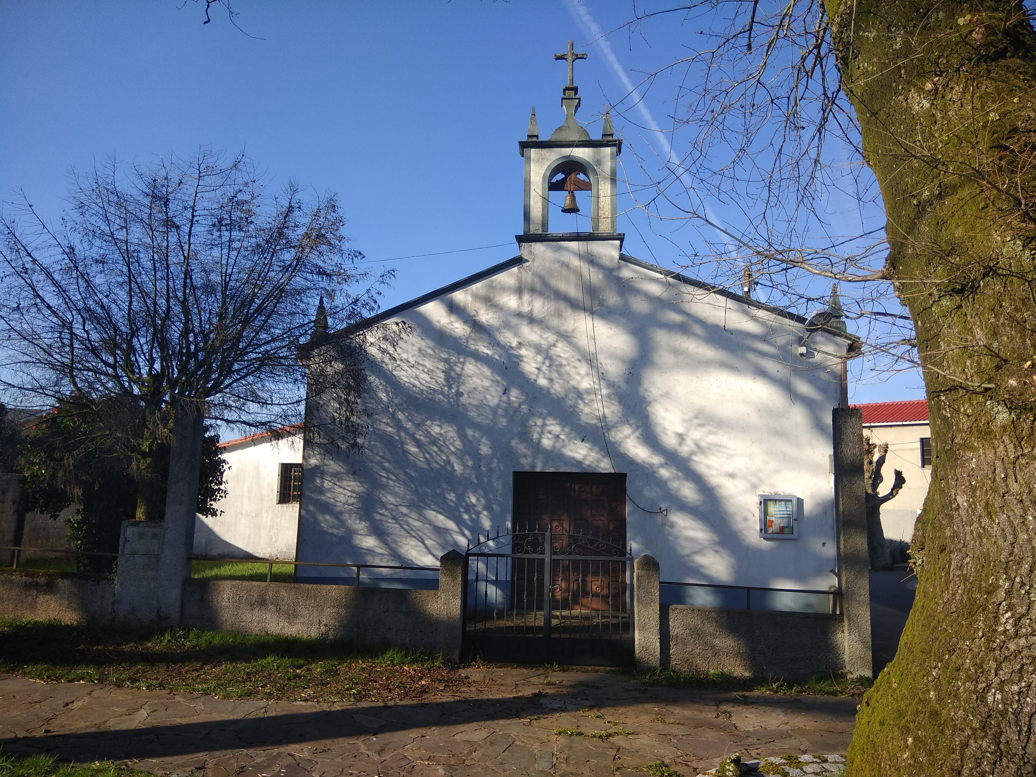 Capela de San Roque das Cruces (Sobrado).